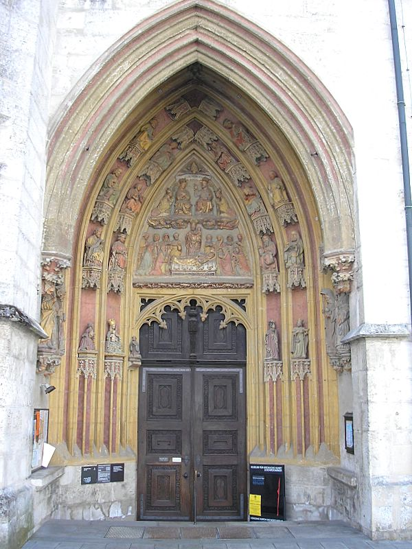 Dom zu Eichstätt (Oberbayern). Das Hauptportal. Eigene Aufnahme, April 2007 / Eichstaett cathedral (Upper Bavaria, Germany). The main portal. Own photo, April 2007